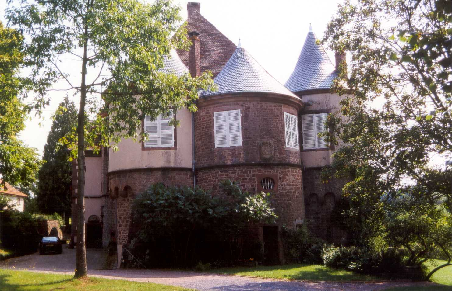 Schloss Birkenwald